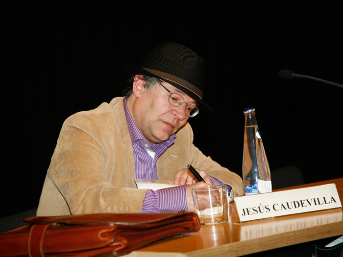 JESÚS CAUDEVILLA PASTOR - Escritor